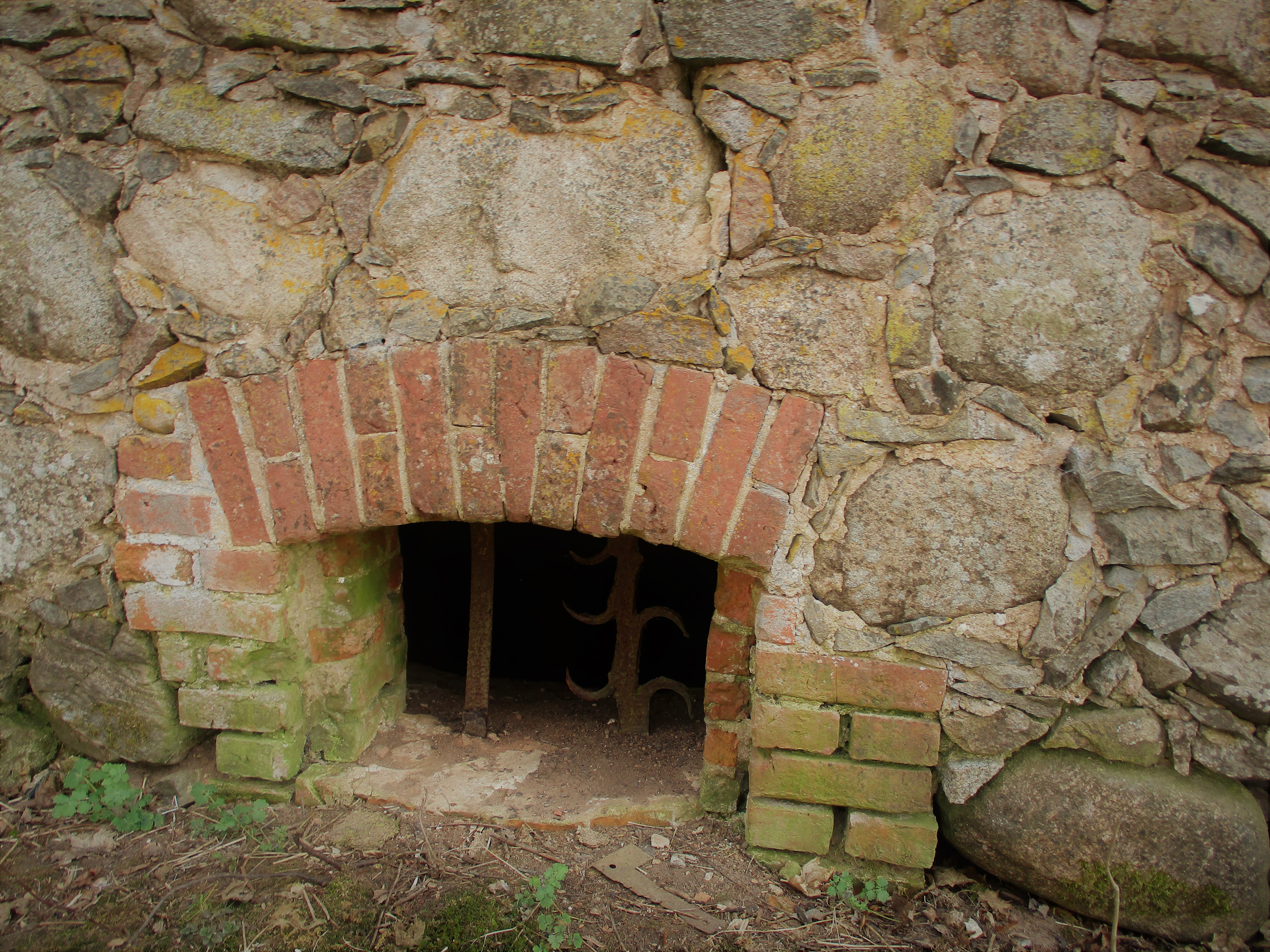 Tsooru linnuseala. Vaade magasiaida põhjakülje keldriaknale.